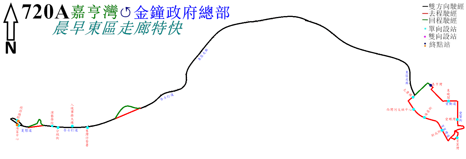 中文（香港）: 新巴720A線的走線圖